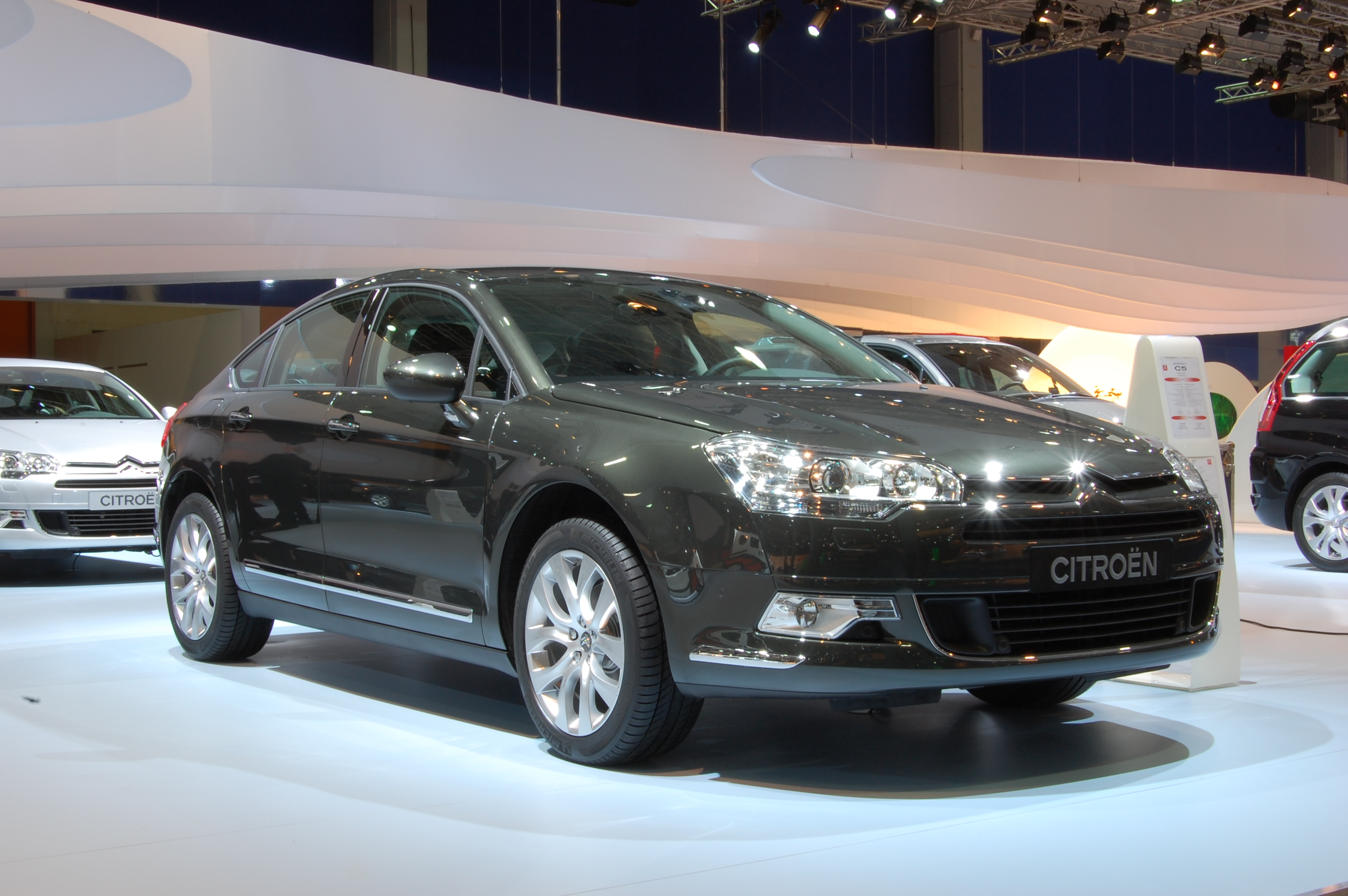 Nouvelle CITROEN C5 au Salon de Bruxelles